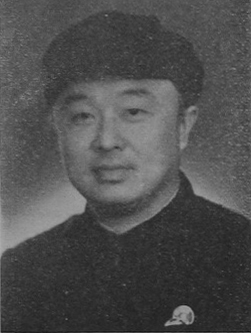 中文（台灣）: 中國人民政治協商會議第一屆全體會議代表